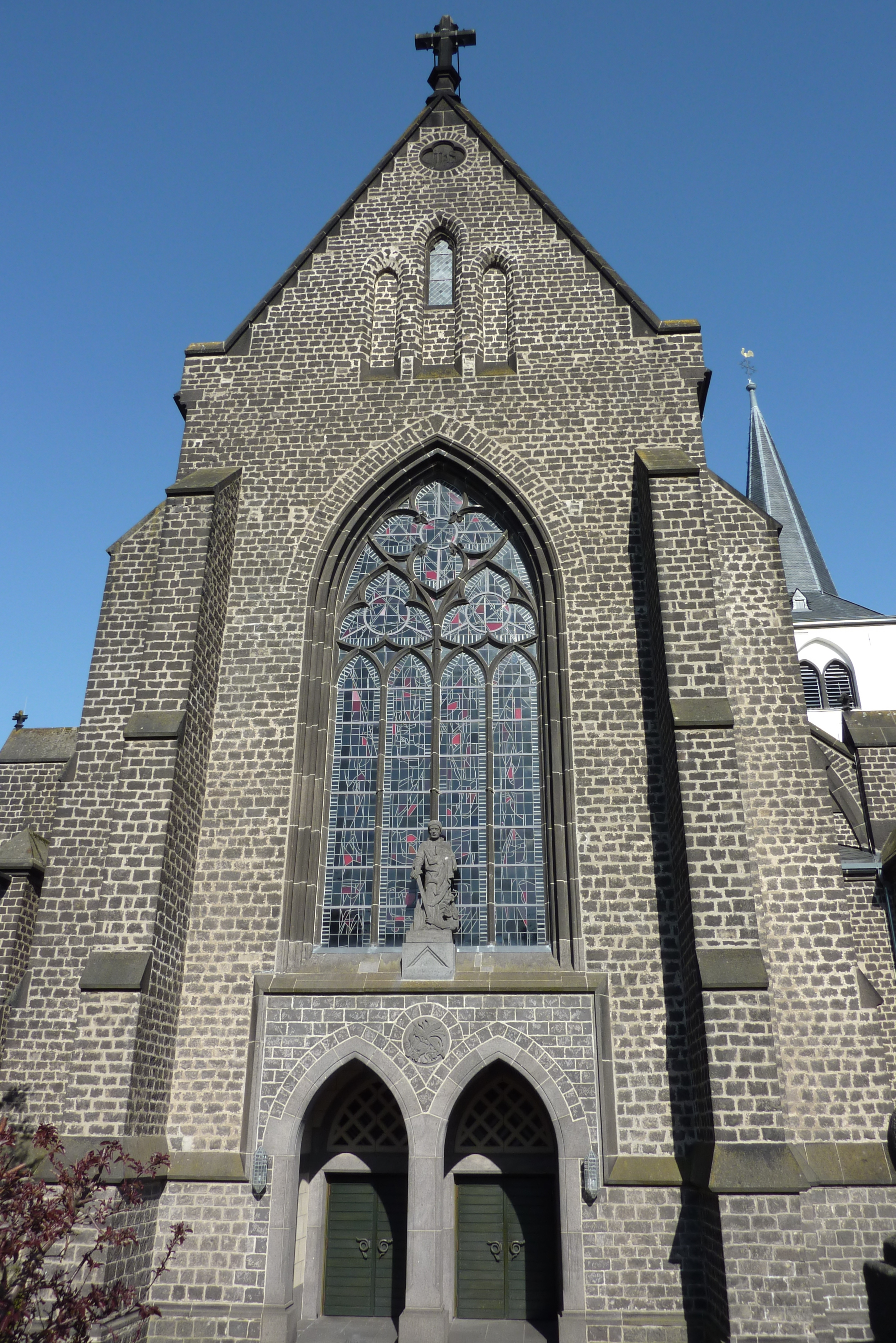 Neugotische Pfarrkirche St. Cyriakus in Niedermendig (Mendig)